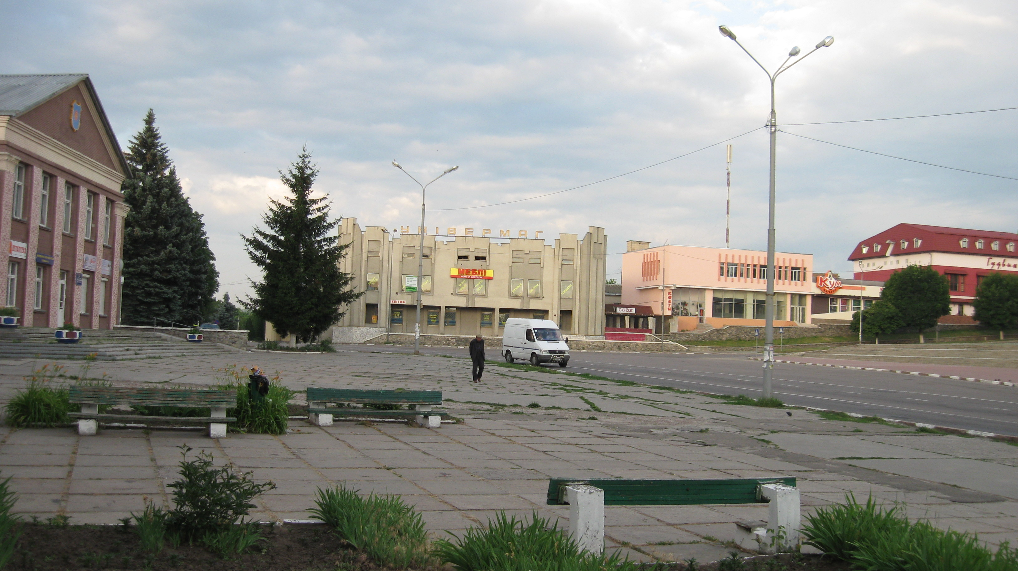 Obuhivas centrā